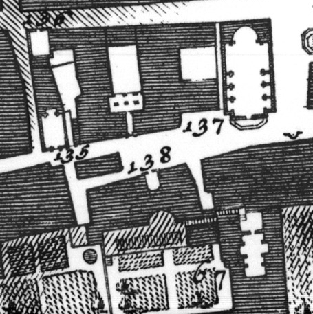 Pianta di Nolli. 67) Santa Maria della Concezione ai Monti, 135) San Salvatore ai Monti, 137) Madonna dei Monti e 138) Santa Maria della Concezione dei Sacconi Turchini.